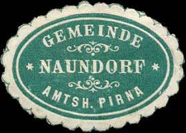 Sealing stamp Title: Gemeinde Naundorf Amtsh. Pirna Description: grün, weiß, geprägt Place: Naundorf size: 3x4 cm